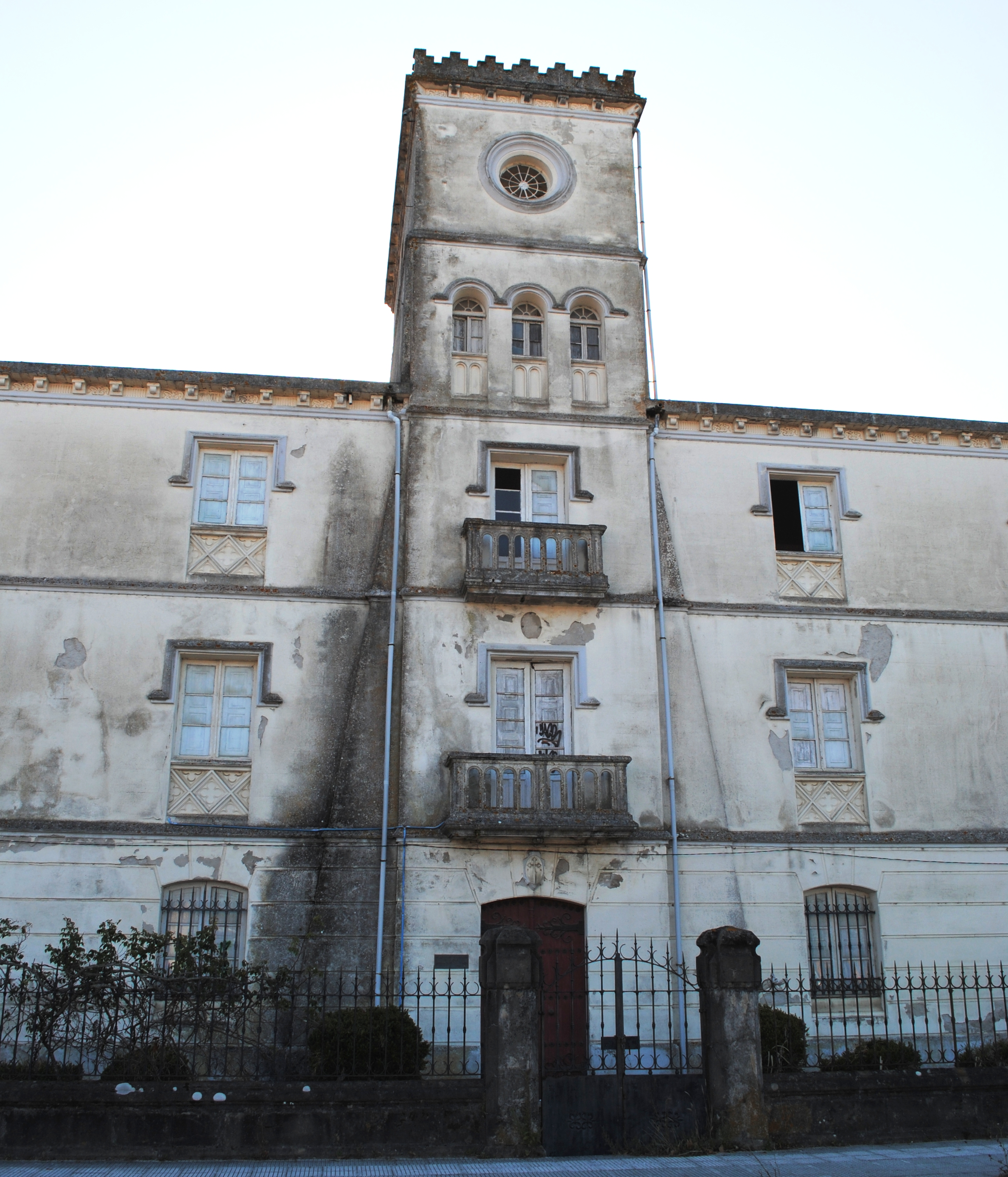 Colexio dos xesuítas de Camposancos.